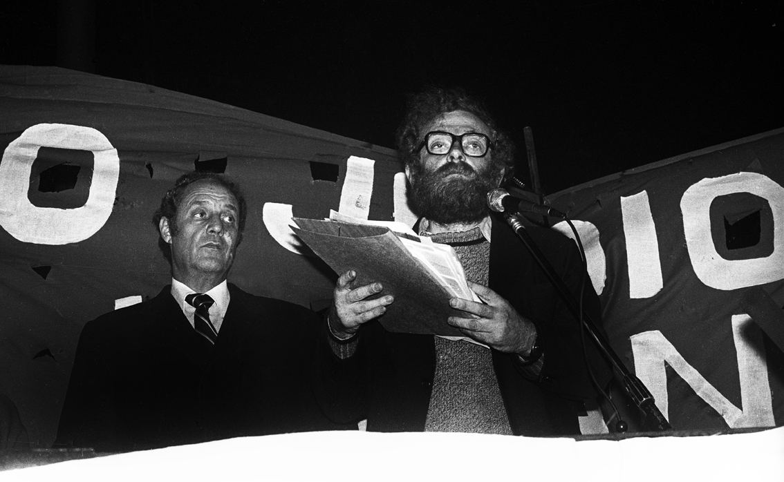 25 de abril de 1984 Acto en el Obelisco por el 41° aniversario del levantamiento de los guetos contra la barbarie nazi, convocado por el Movimiento Judío por los Derechos Humanos